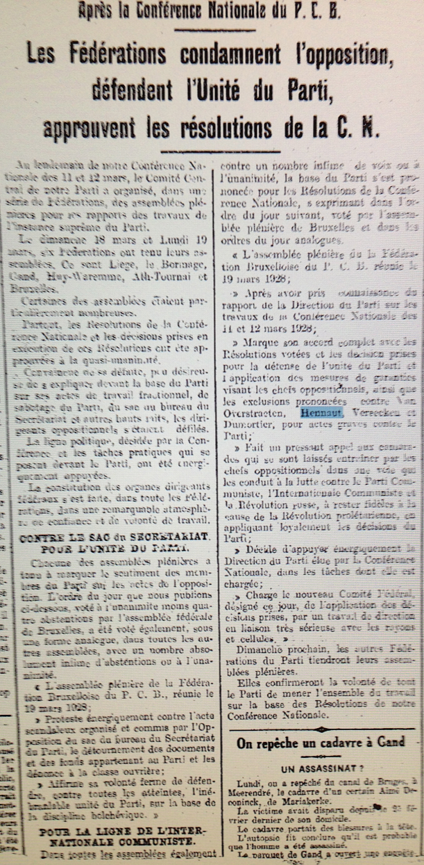 Exclusion de l'opposition